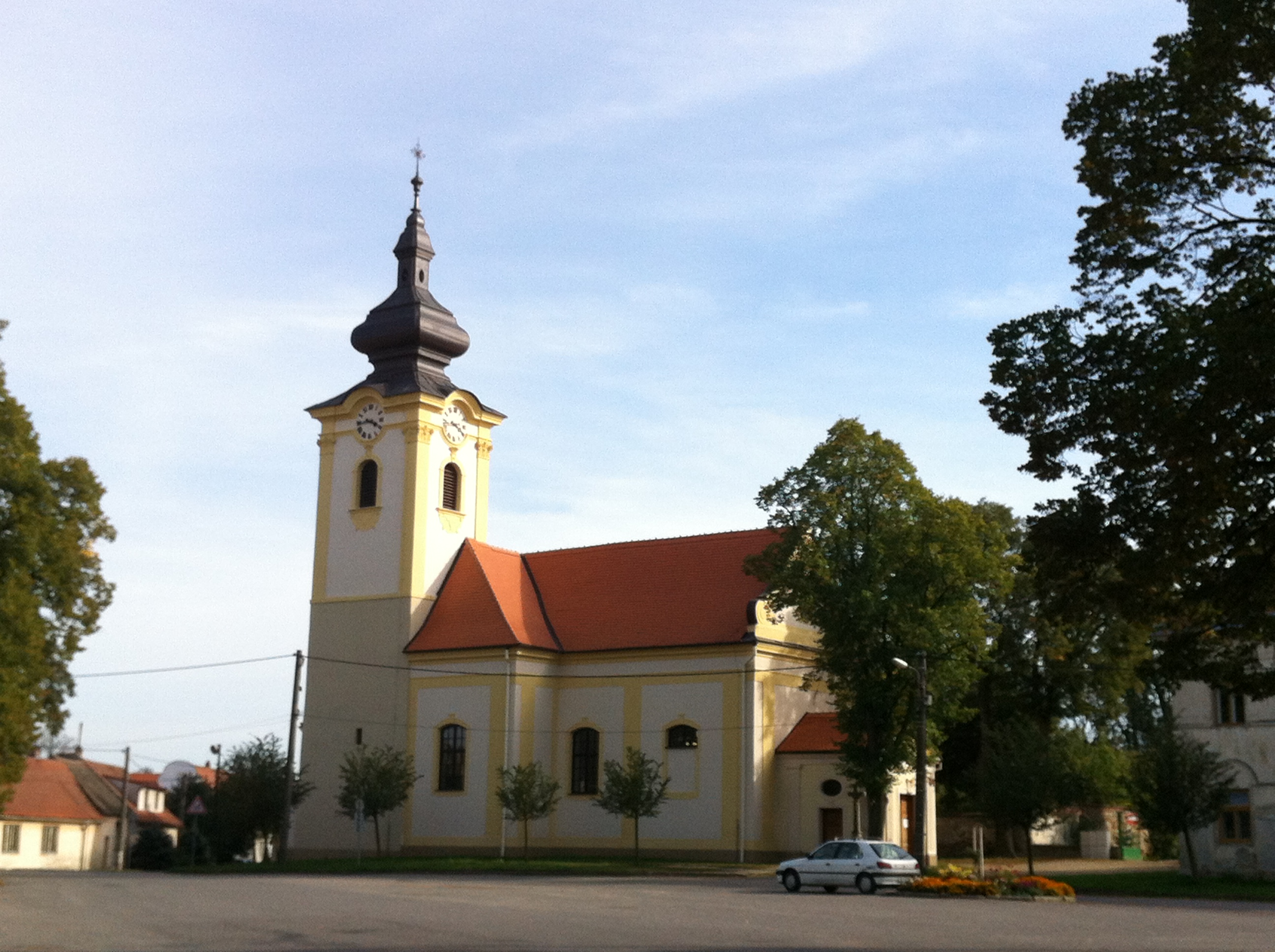 Kostel sv. Františka Serafinského (Hostim), Hostim